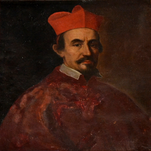 Ritratto di Franciotto Orsini